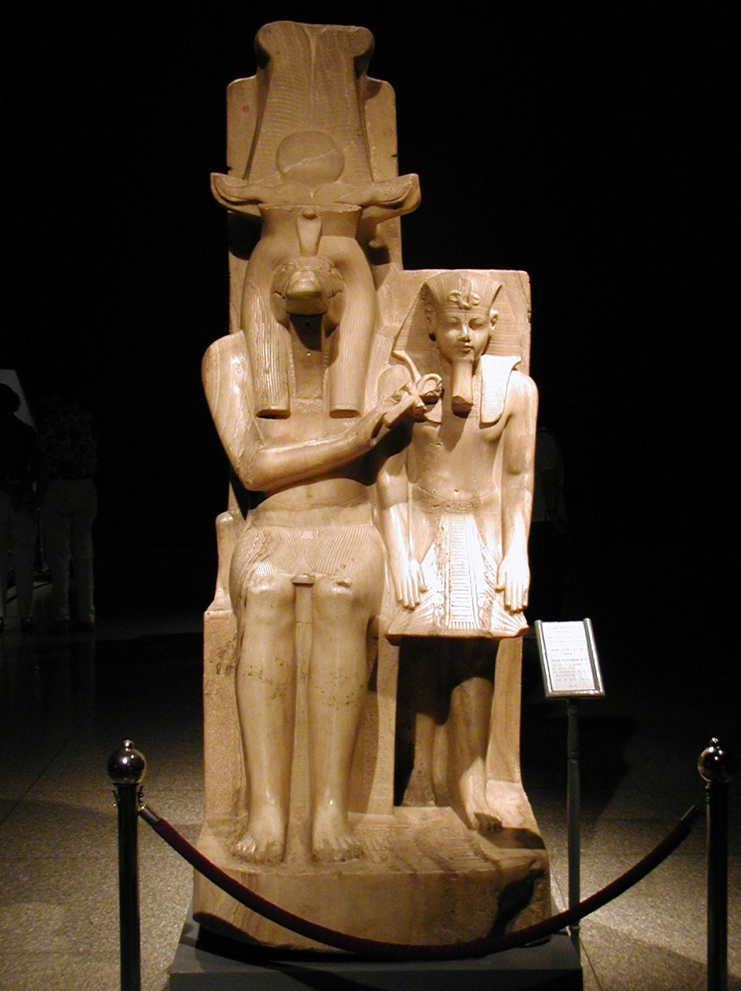 Antiquité égyptienne, Musée de Louxor, (Égypte). Amenhotep III y Sobek (Templo de Sobek en Dahamsha) - Dinastía XVIII